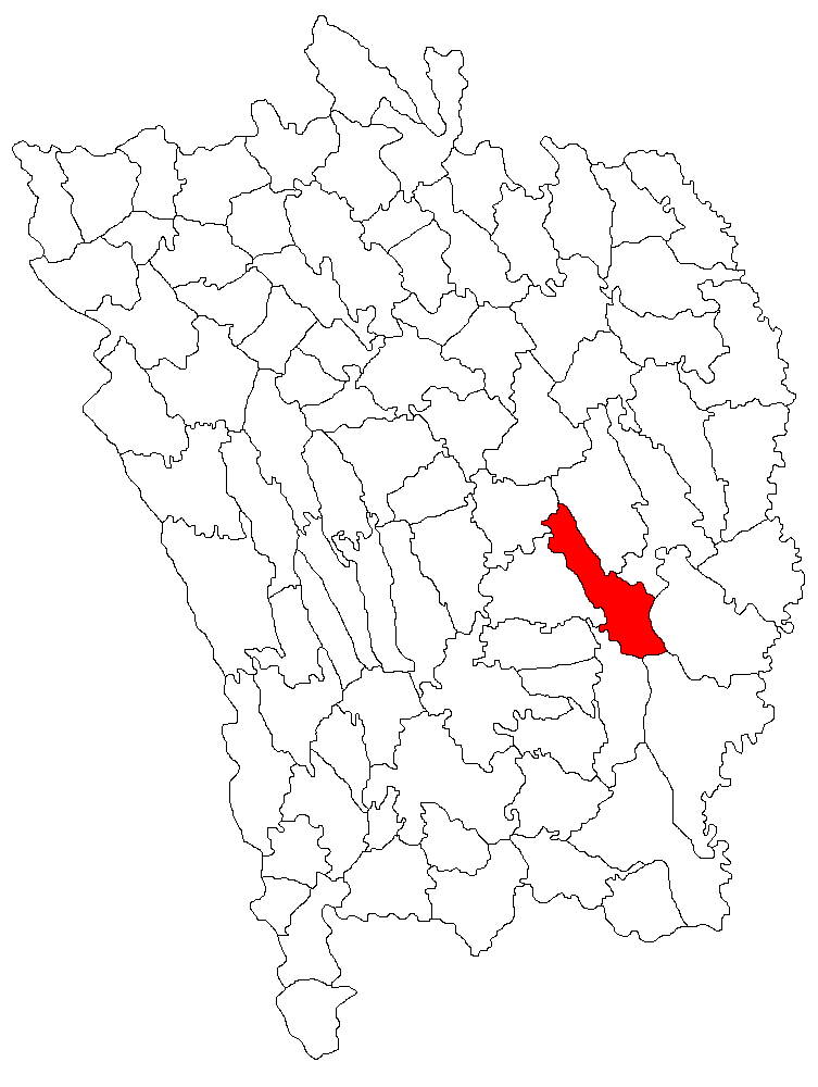 Categorie:Hărţi ale judeţului Vaslui